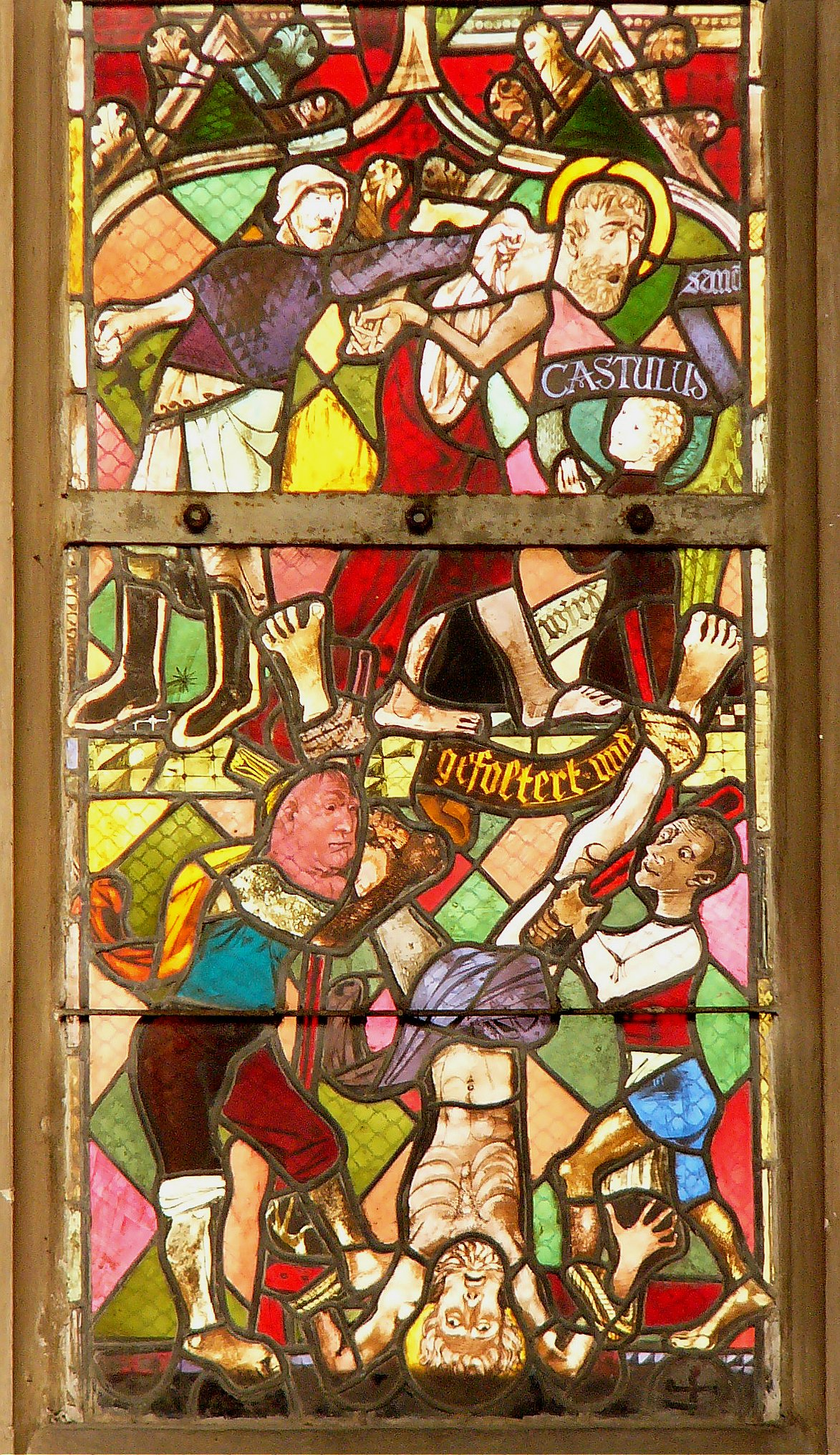 Ein Fenster in der Stiftsbasilika St. Martin in Landshut. Es zeigt das Martyrium des Hl. Kastulus.